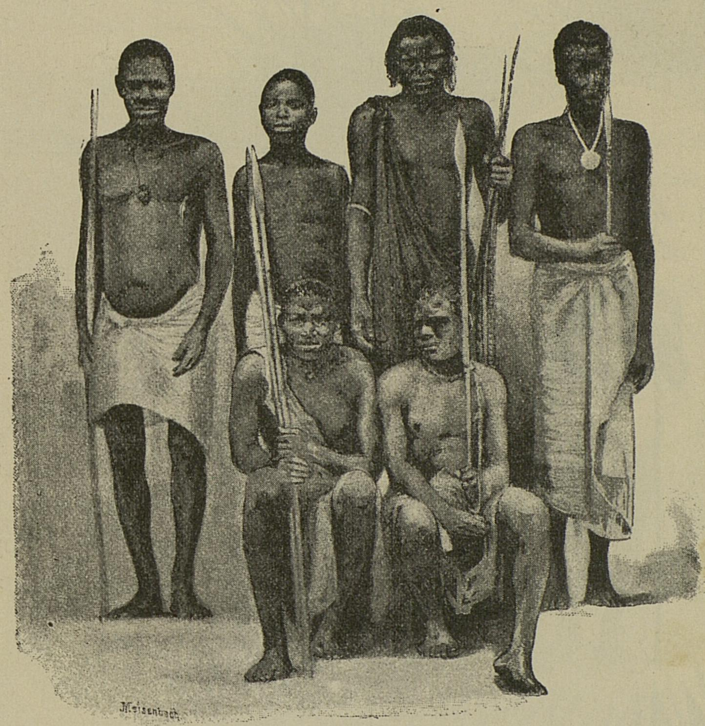 Illustrasjon hentet fra boken "Den tyske Emin Pascha-Expedition" av Peters, Carl og utgitt av Forlagsbureauet (Kjøbenhavn, 1891)